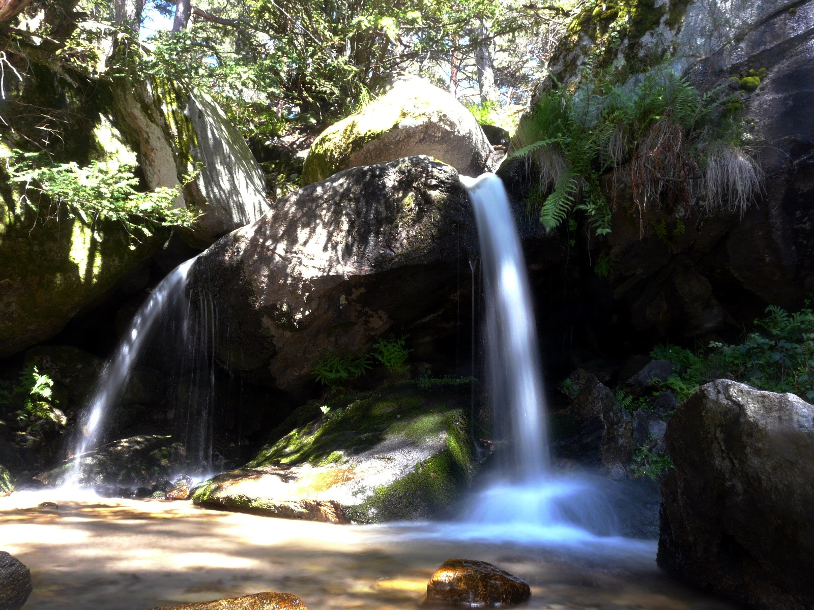 Ducha de los Alemanes en la Sierra de Guadarrama